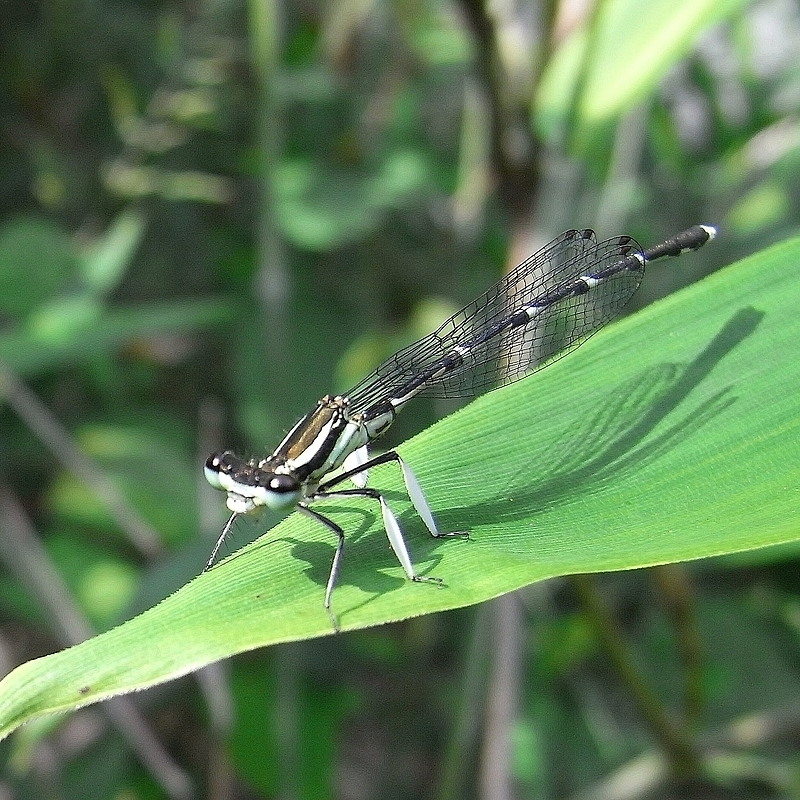 GUNBAI-TOMBO (Platycnemididae) Platycnemis foliacea sasakii (Asahina, 1949)